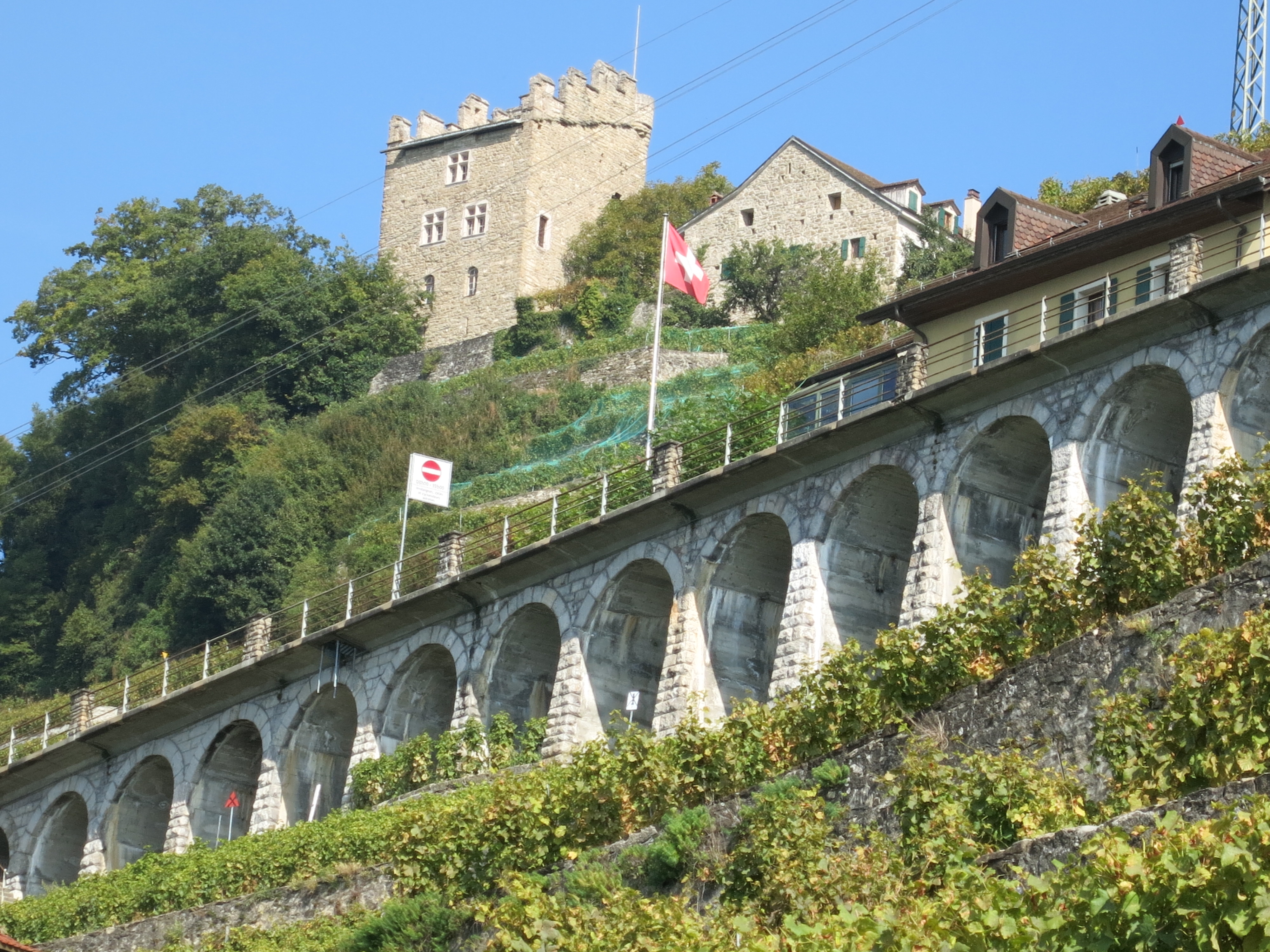 Turm von Marsens, Puidoux VD, Schweiz